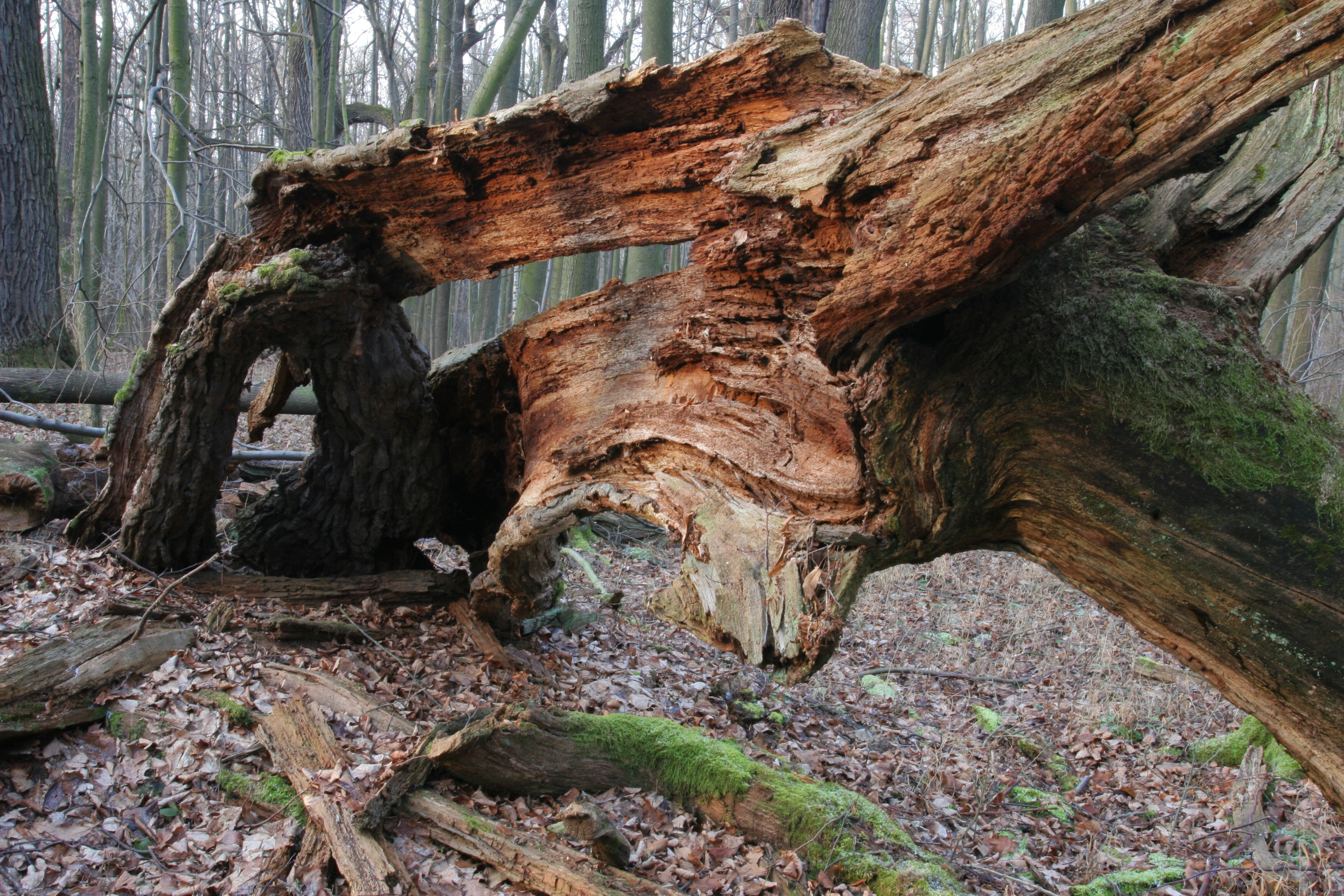 torzo mohutného stromu v Choltické oboře